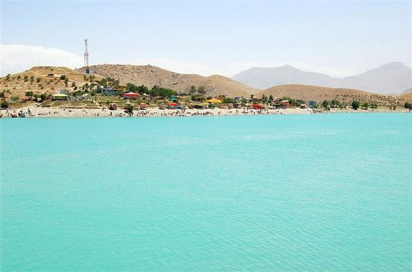 Lake Qargha in Kabul, Afghanistan